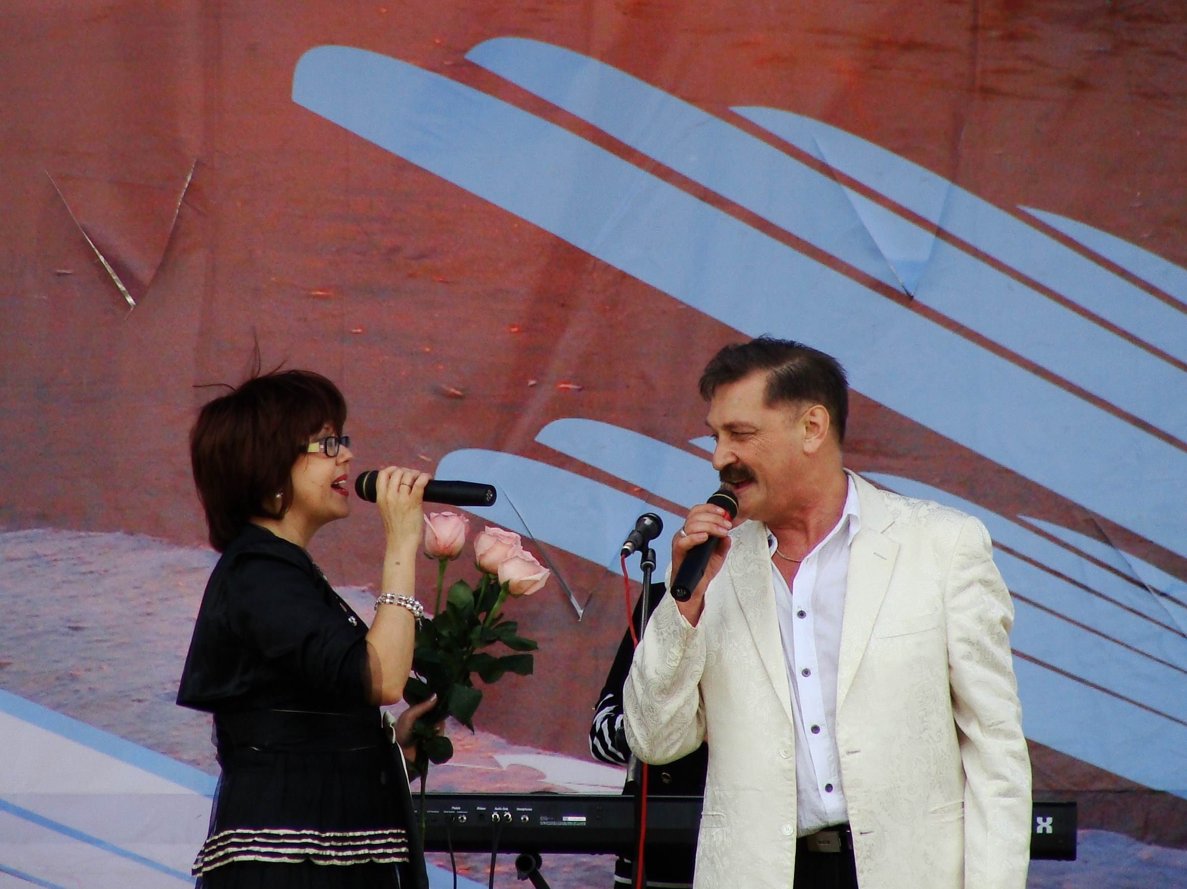 Супруги Тиханович Александр Григорьевич и Поплавская Ядвига Константиновна (экс-участники ансамбля "Верасы" (г.Минск))выступают на Дне Рождения города Северодвинска и Дне ВМФ (празднуются в один день).